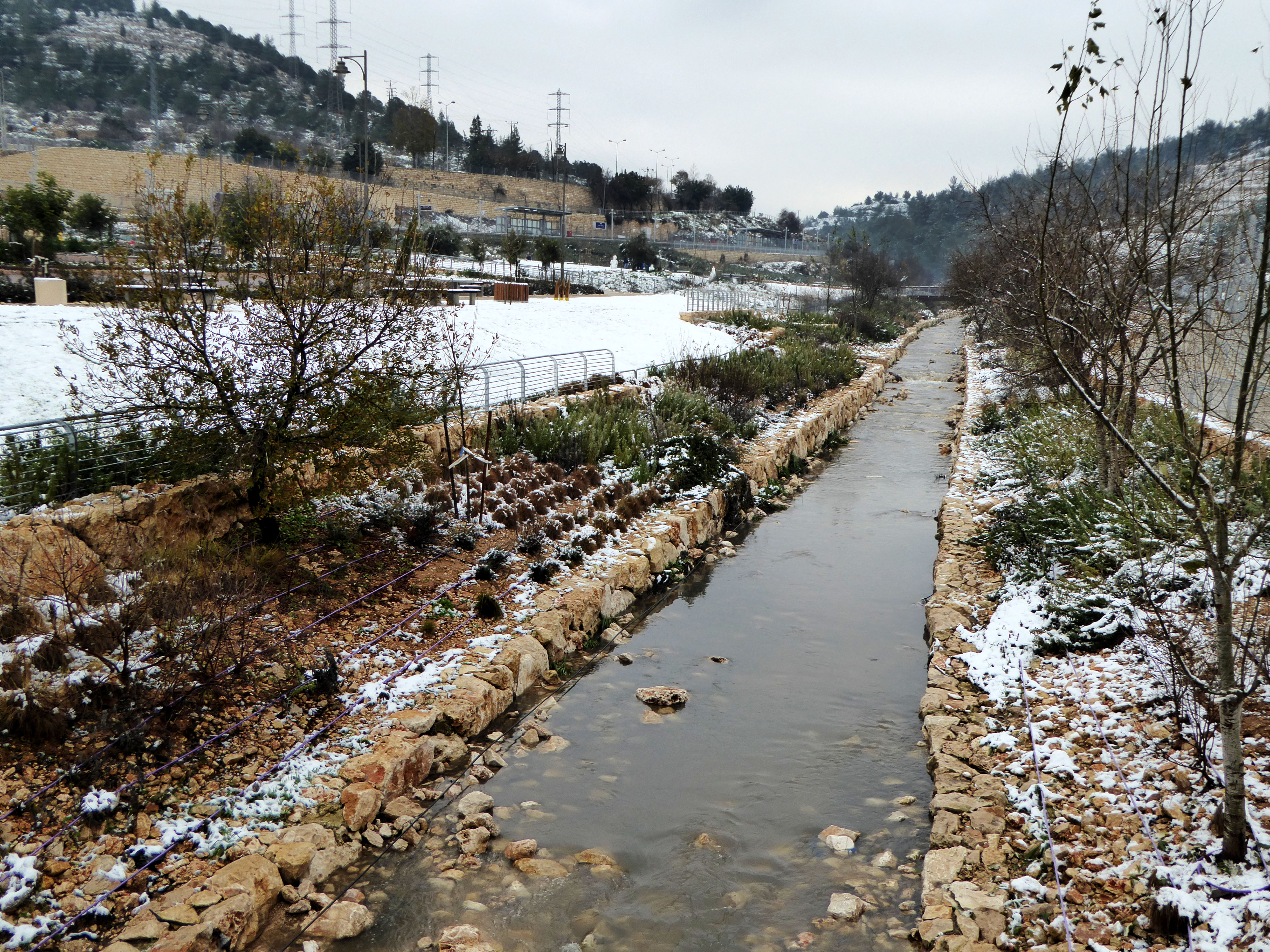 זרימת מים בנחל רפאים בשלג 2015, בסמוך לעין יעל.